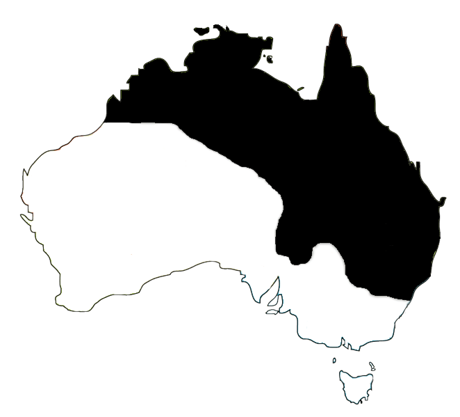 Distribution of Litoria caerulea, Litoria caerulea